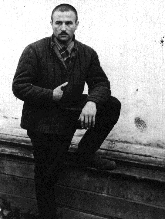 Anatoly Rubin in laborcamps